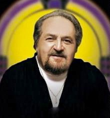 Photo collection privée